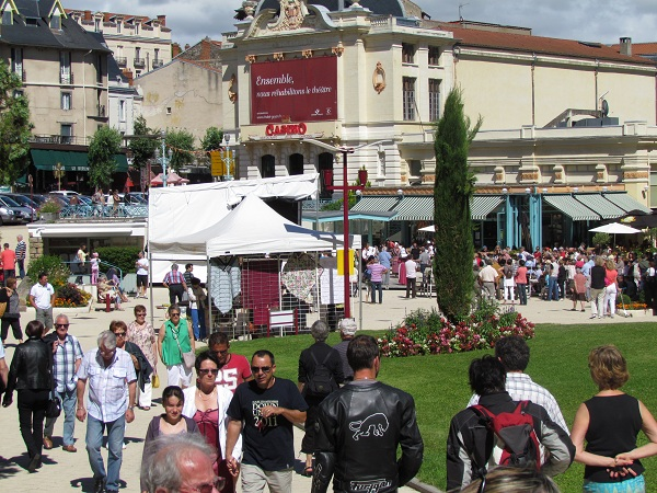 Parc Thermal durant la saison estivale